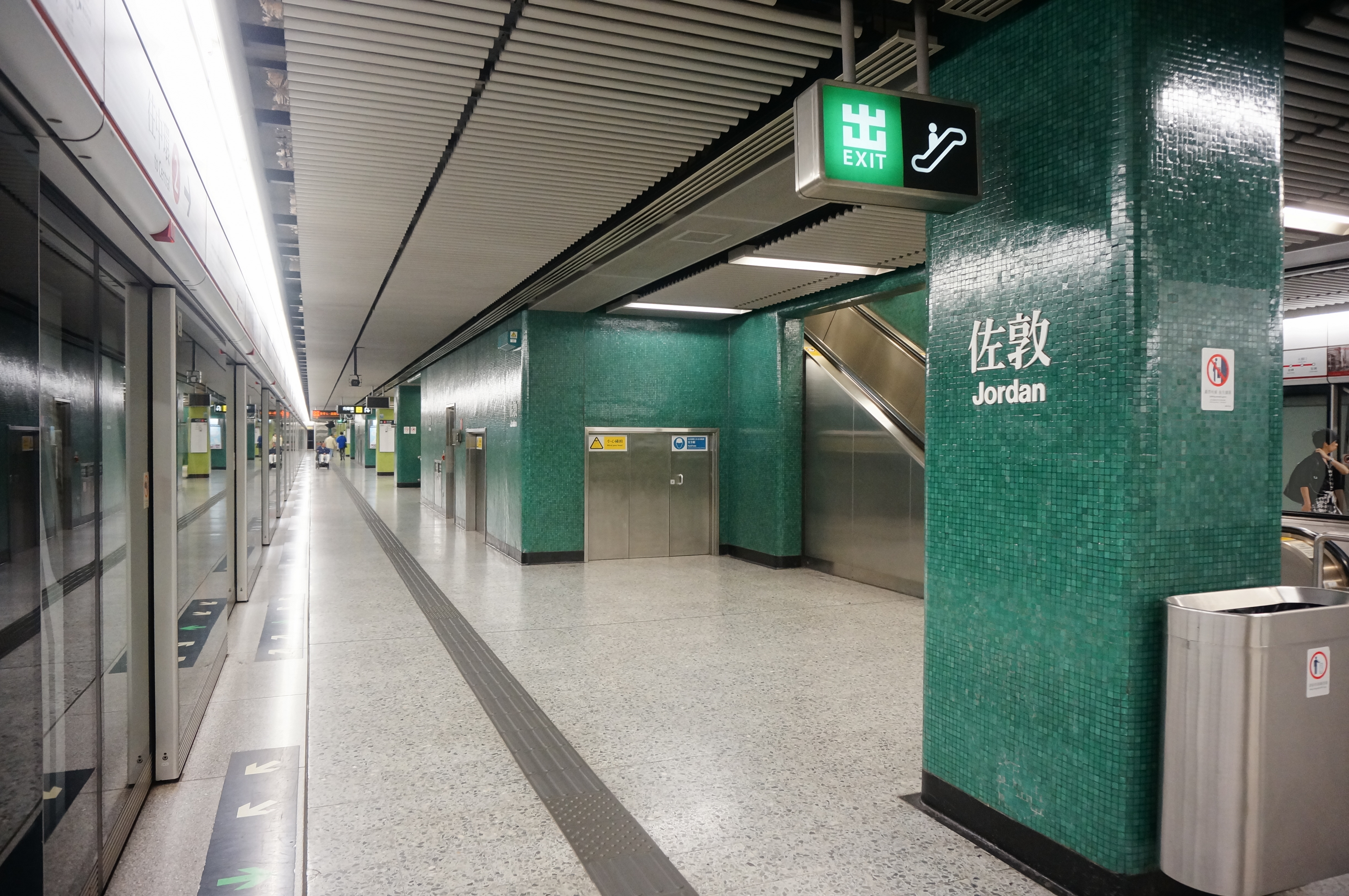 港鐵佐敦站月台